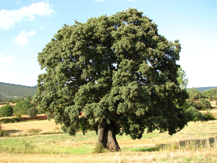 Carrasca de las Raboseras, Alobras, España